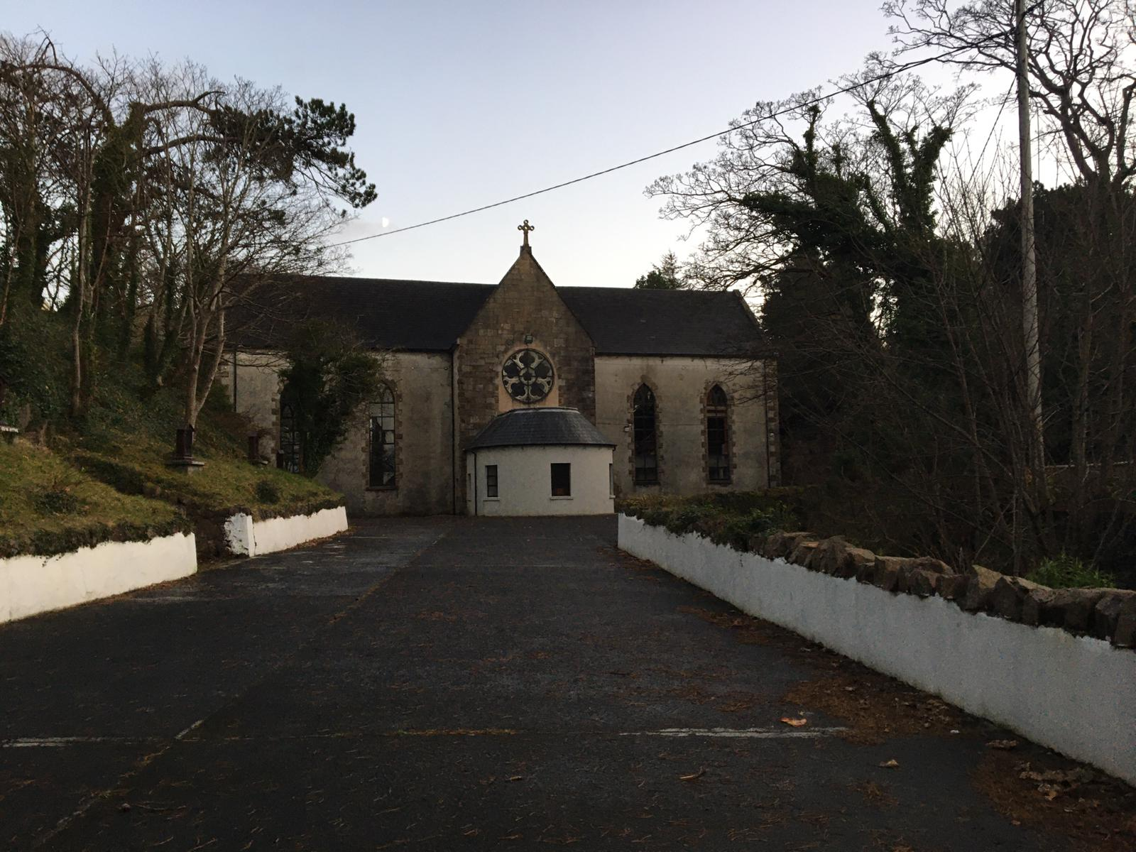 Sean Teach Phobail na Doirí Beaga